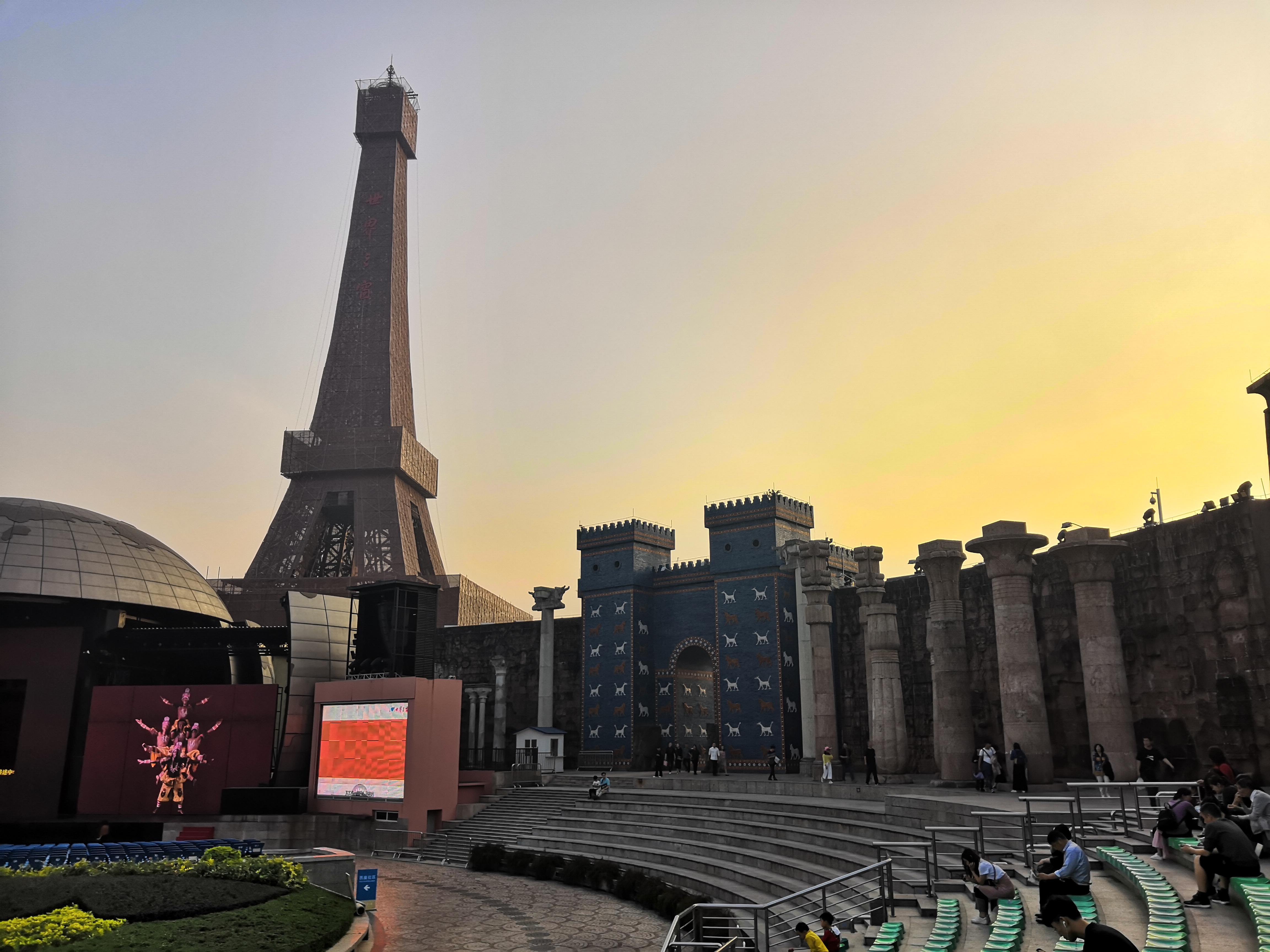 中文（中国大陆）: 深圳 世界之窗